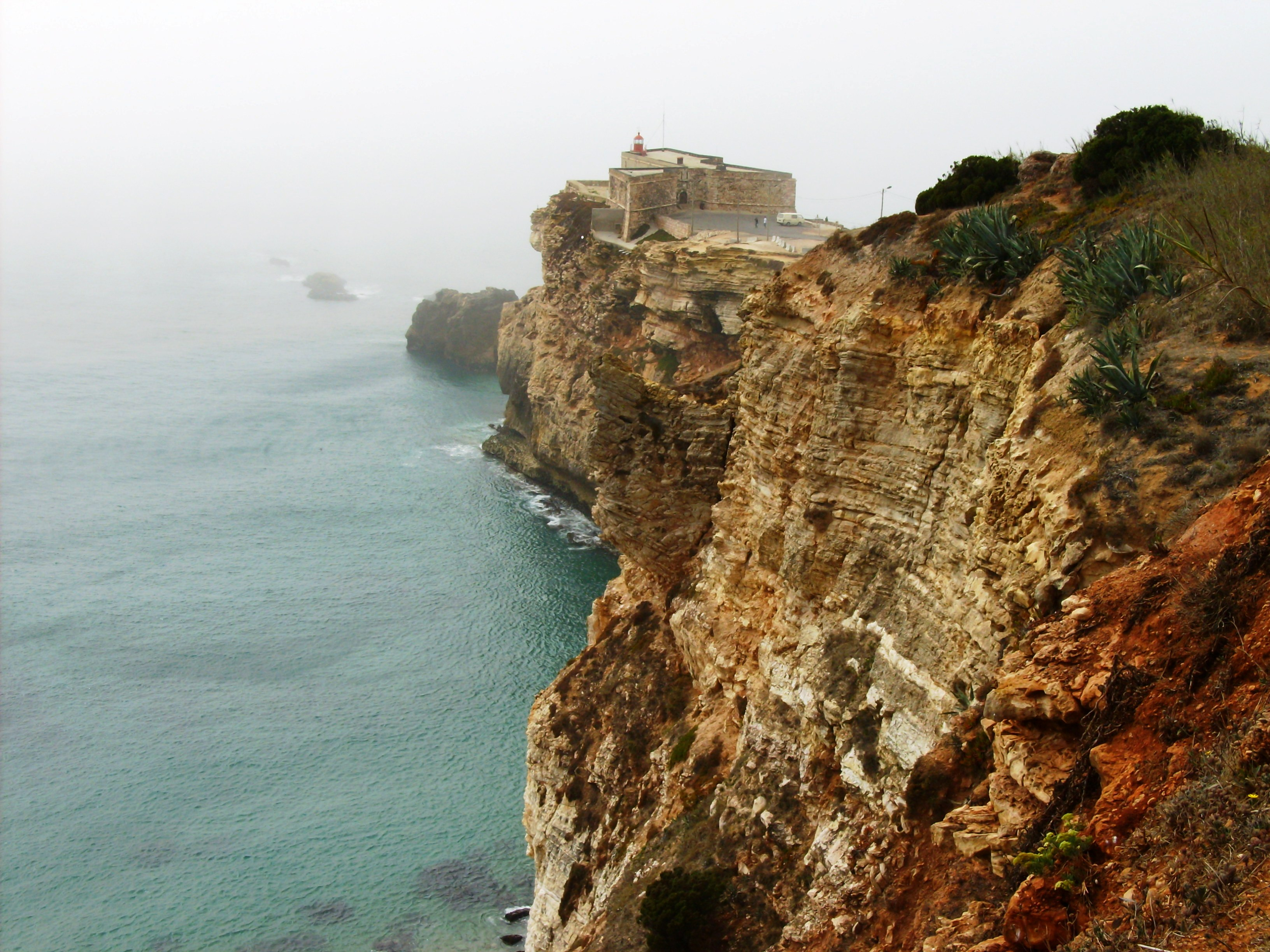 Forte de São Miguel, Nazaré, distrito de Leiria, Portugal: vista panorâmica